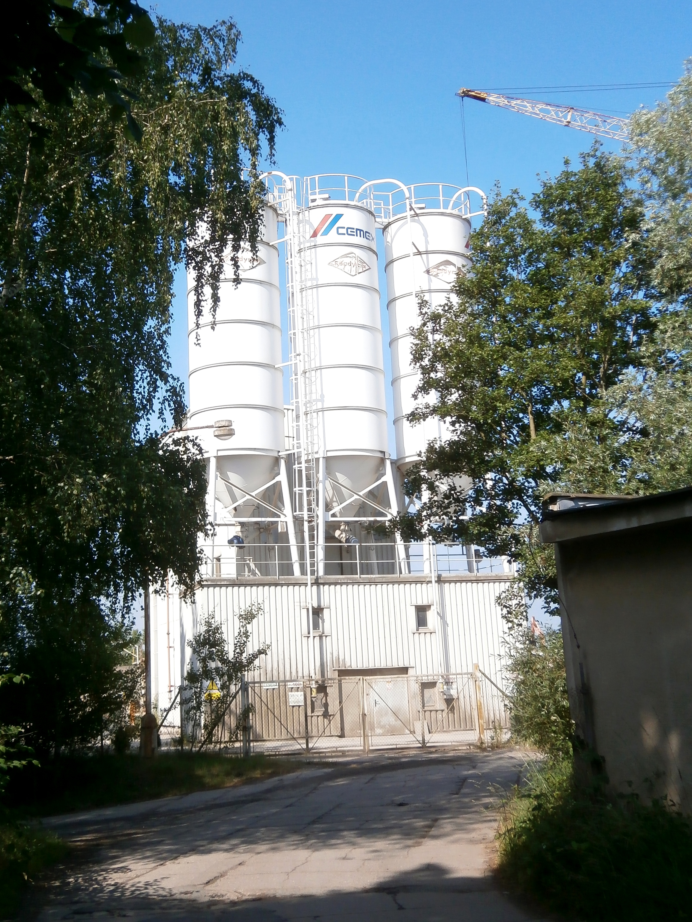 Panelárna v Plačicích